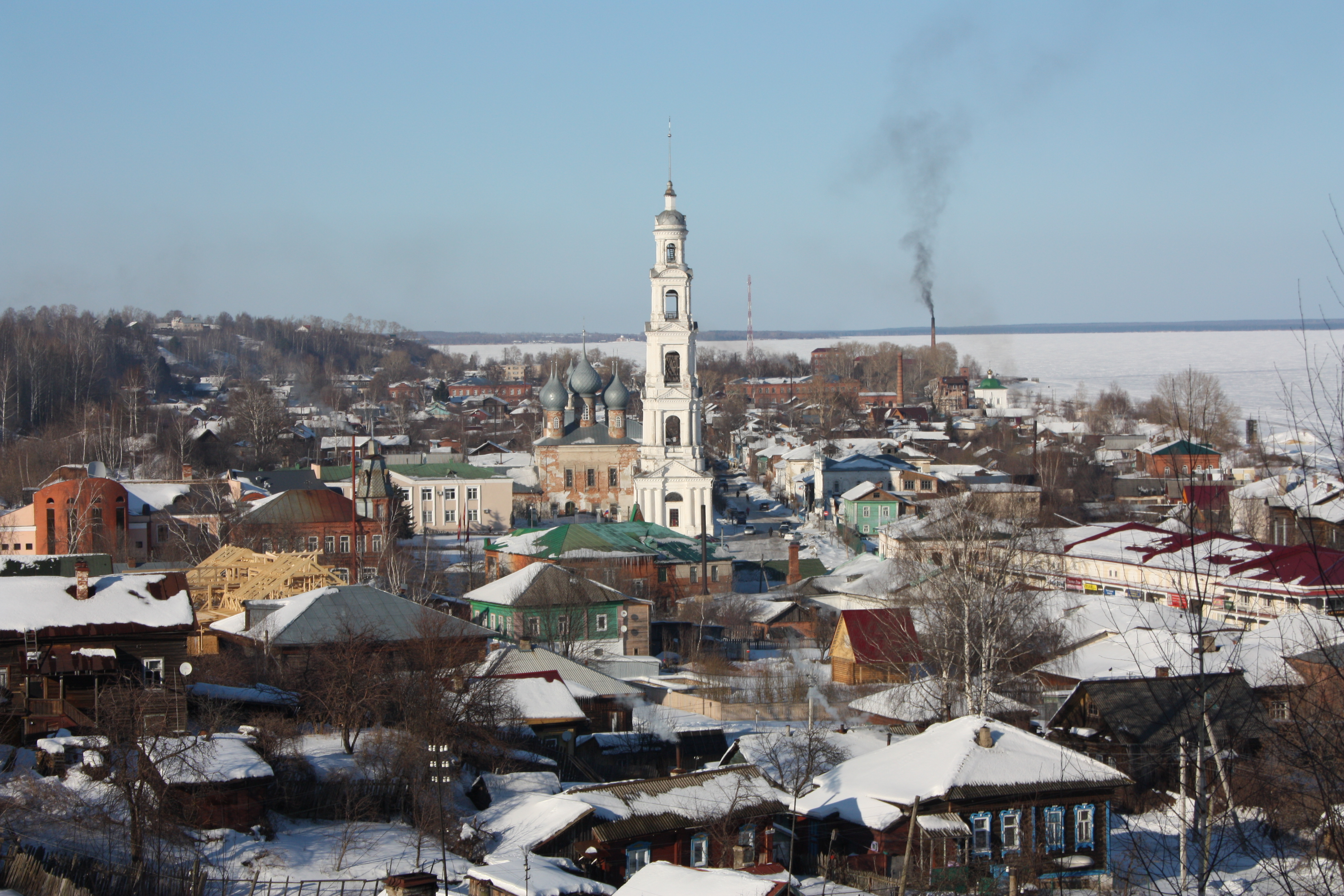 Город Юрьевец, Ивановская область